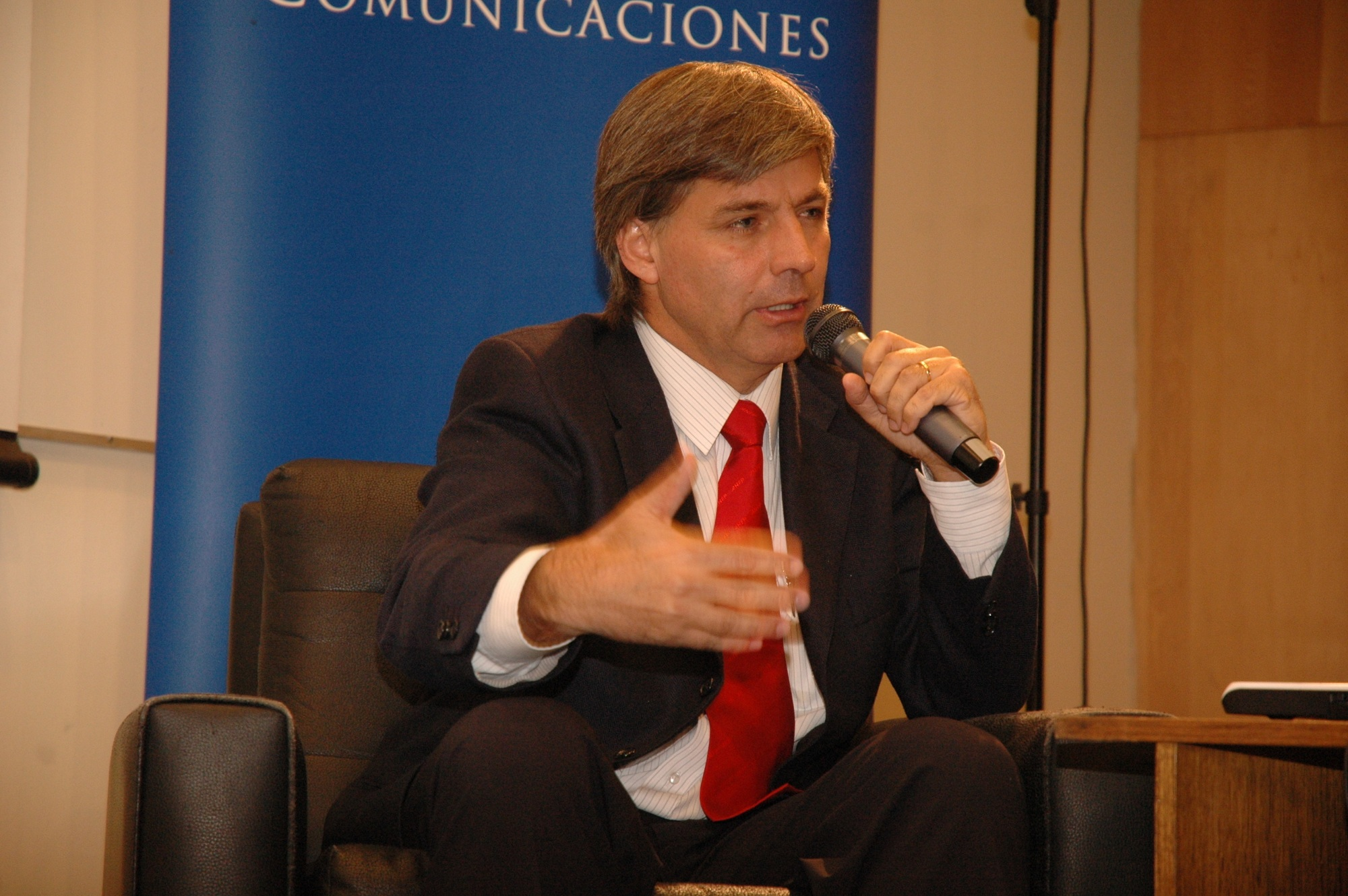 El encuentro reunió a Harold Mayne-Nicholls, ex alumno de periodismo de la UC, con aproximadamente 120 estudiantes, quienes escucharon su visión sobre el fútbol actual y sus proyecciones.